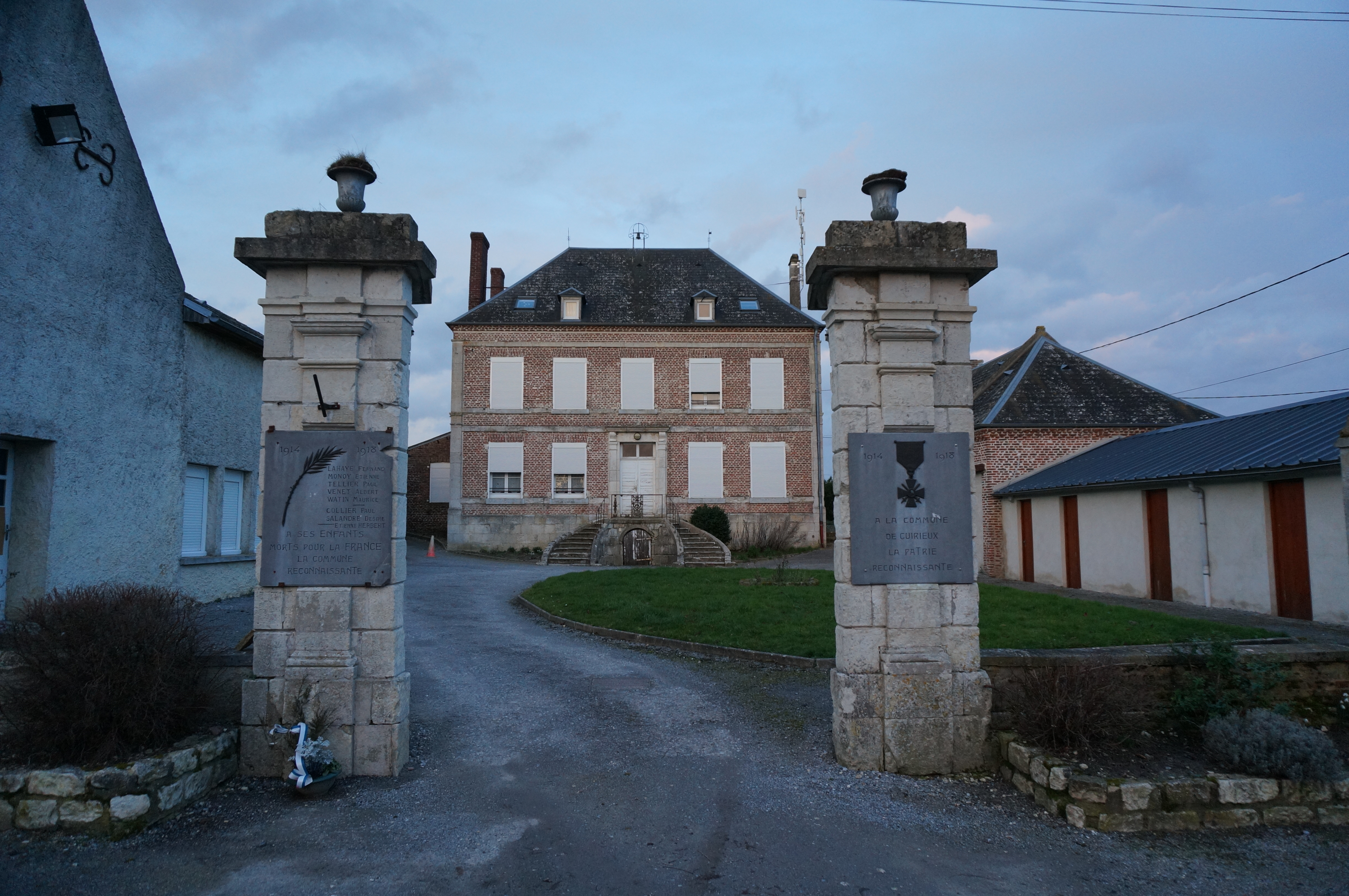 Vue de Cuirieux.